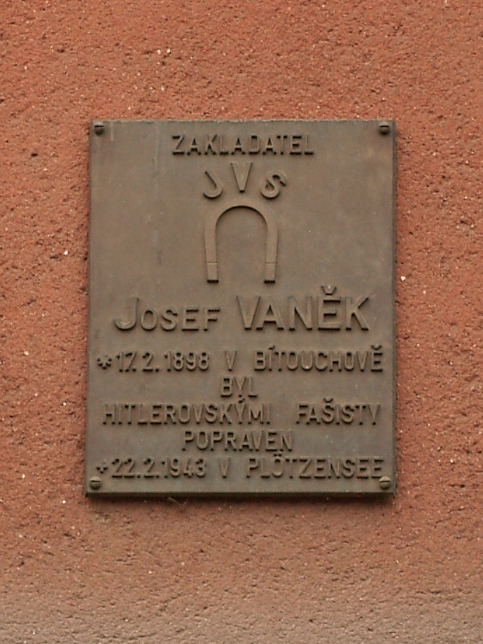 Pamětní deska Josefa Vaňka v Semilech v ulici 3. května, dům Rezlerova čp. 512.